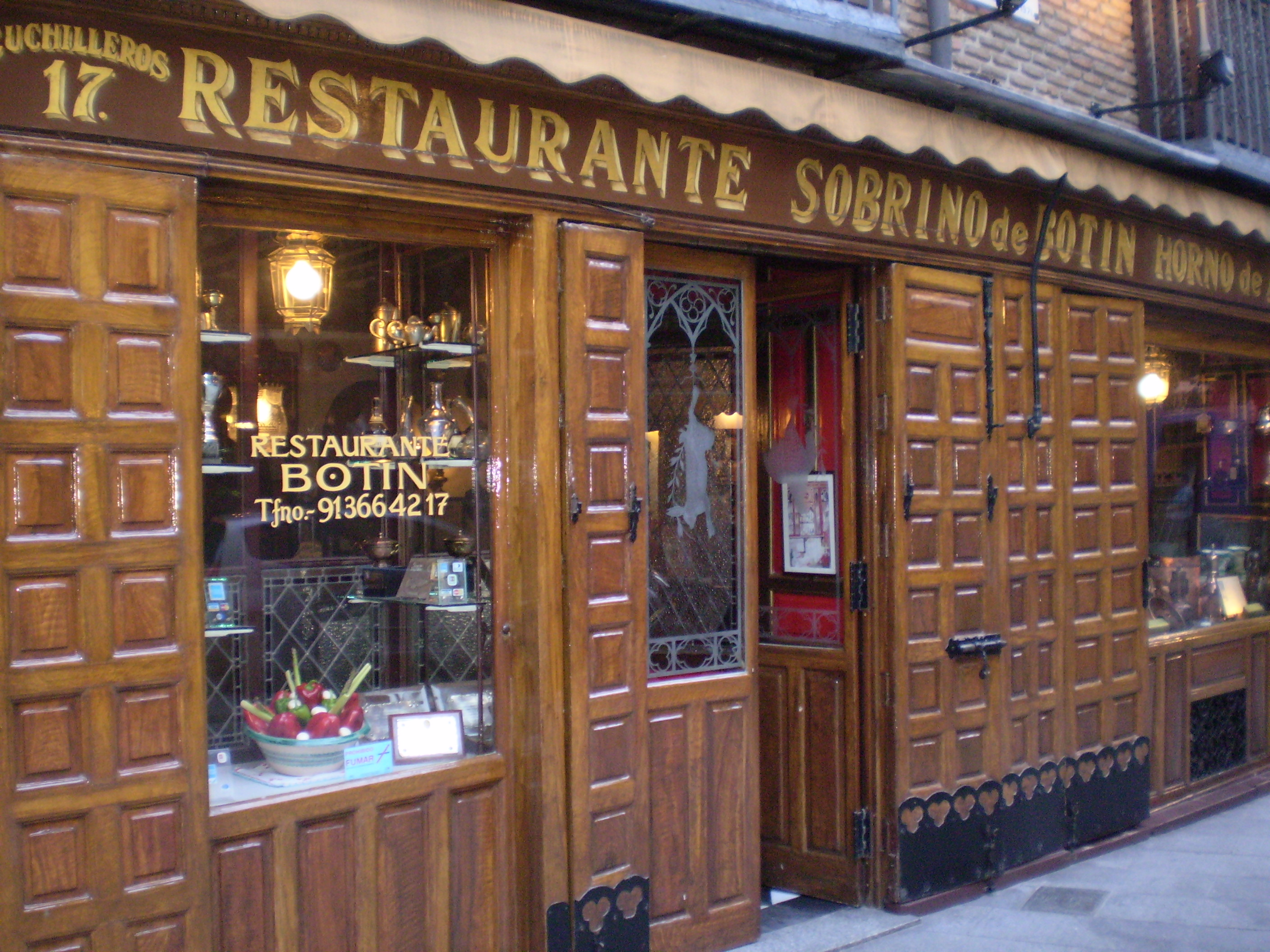 Casa Botín, en Madrid (España), es el restaurante más antiguo del mundo